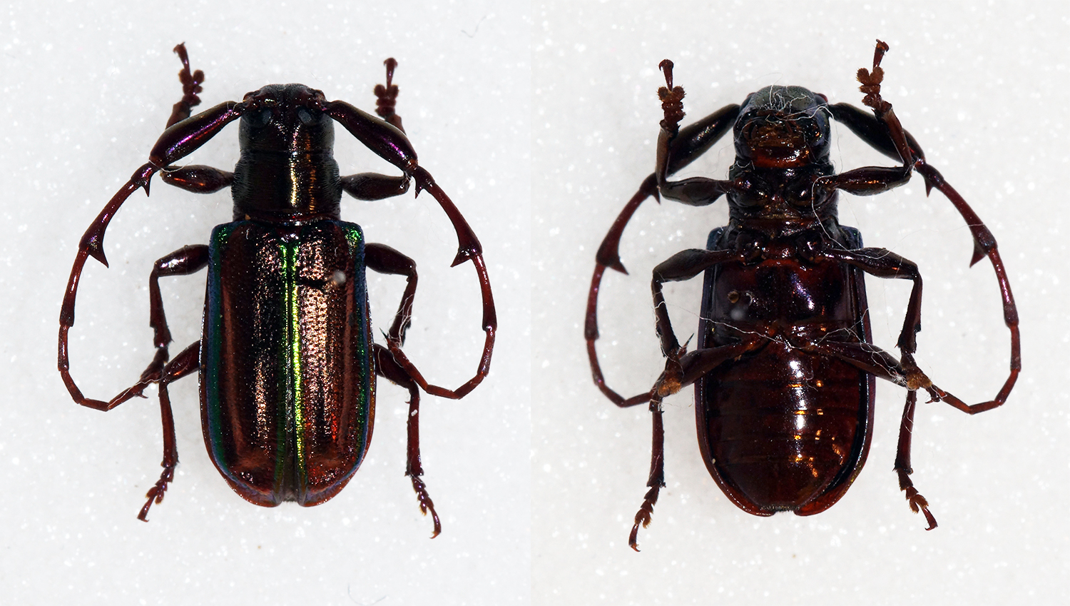 Blanchard,1843 Sex: ? Data: 12-2014 - Rio Venado - Junin - Satipo - Peru Size: 9mm